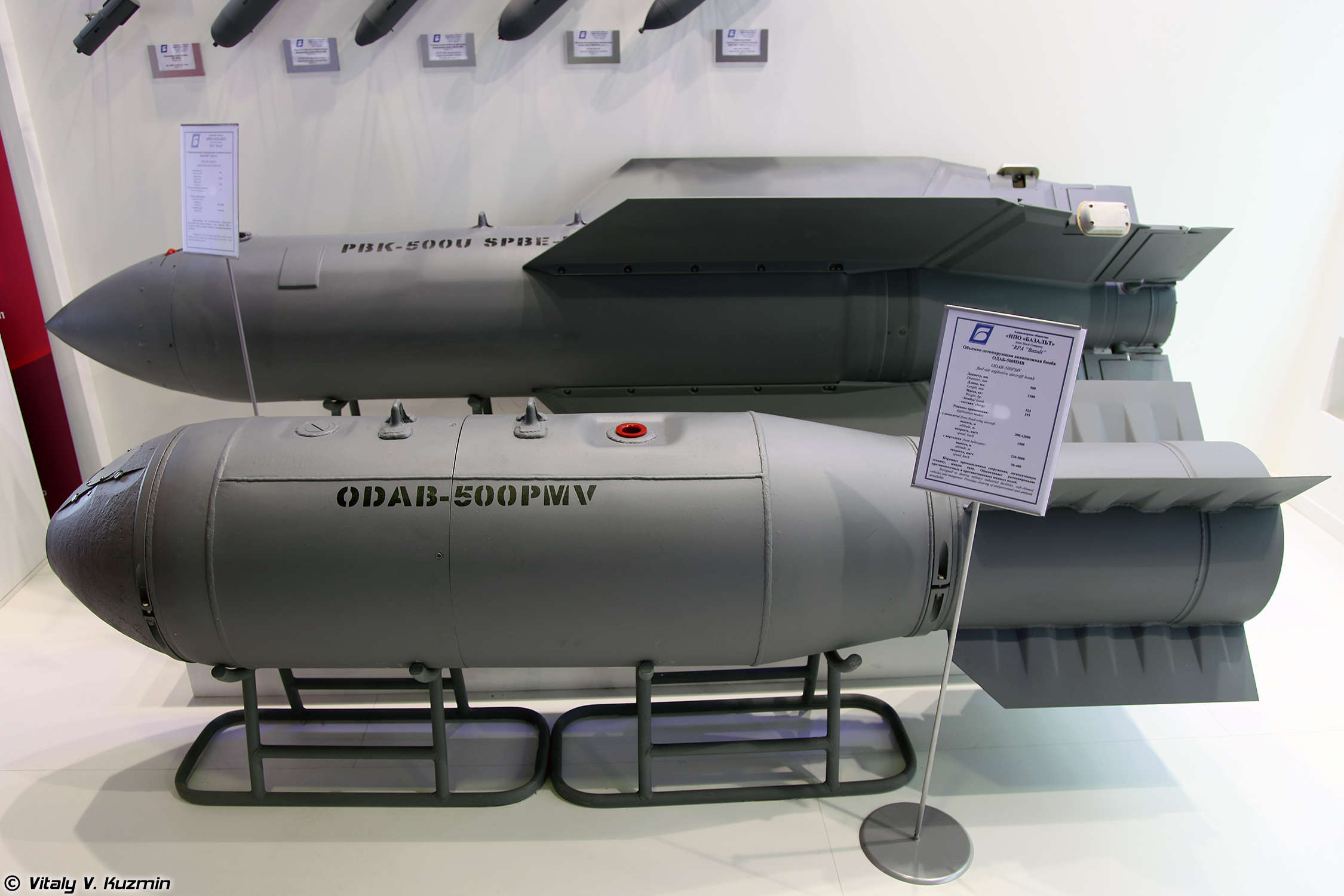 Бомбовая кассета ПБК-500У СПБЭ-К и авиационная бомба ОДАБ-500ПМВ (PBK-500U SPBE-K cluster bomb and ODAB-500PMV bomb)